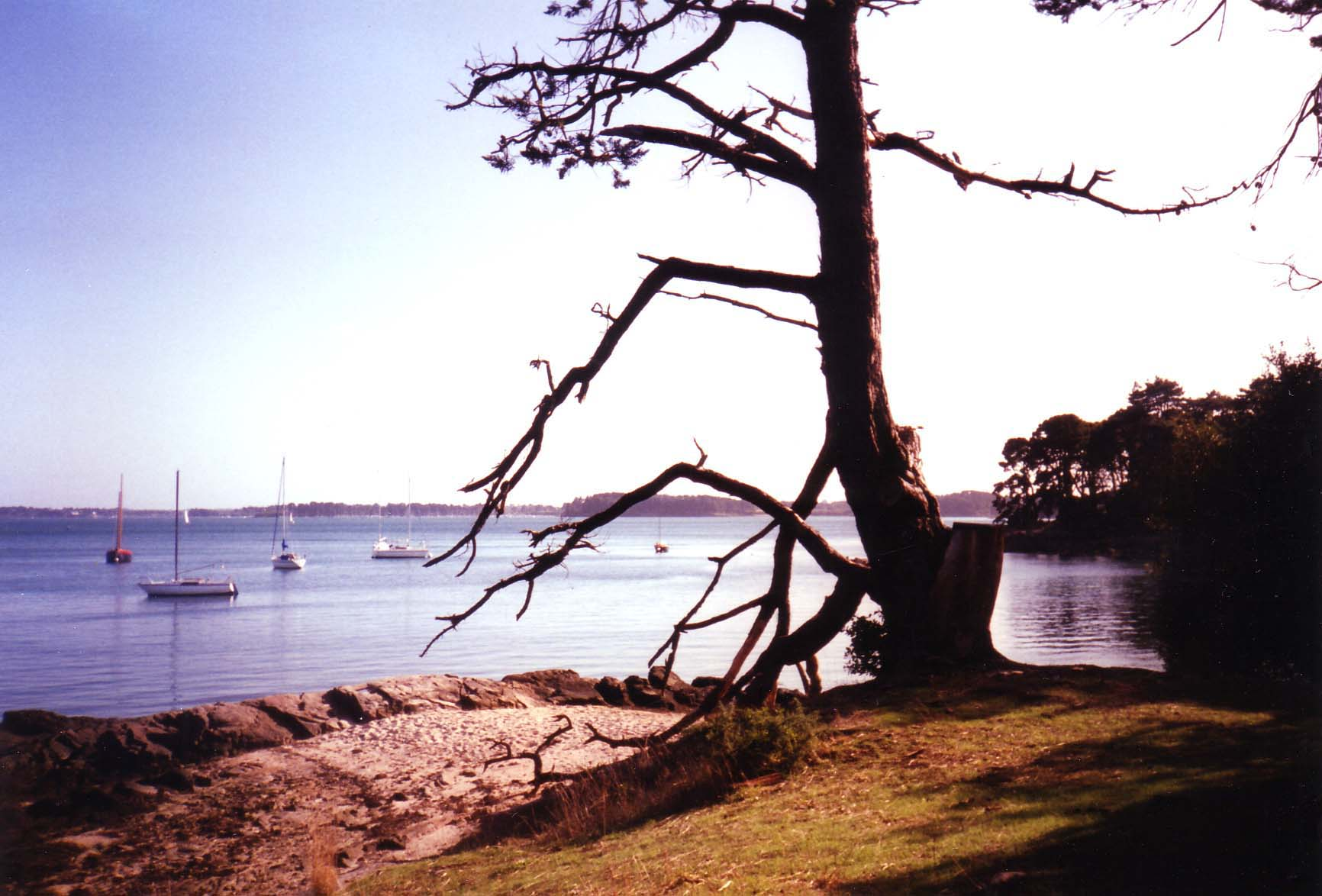 Île Berder, golfe du Morbihan, Bretagne.